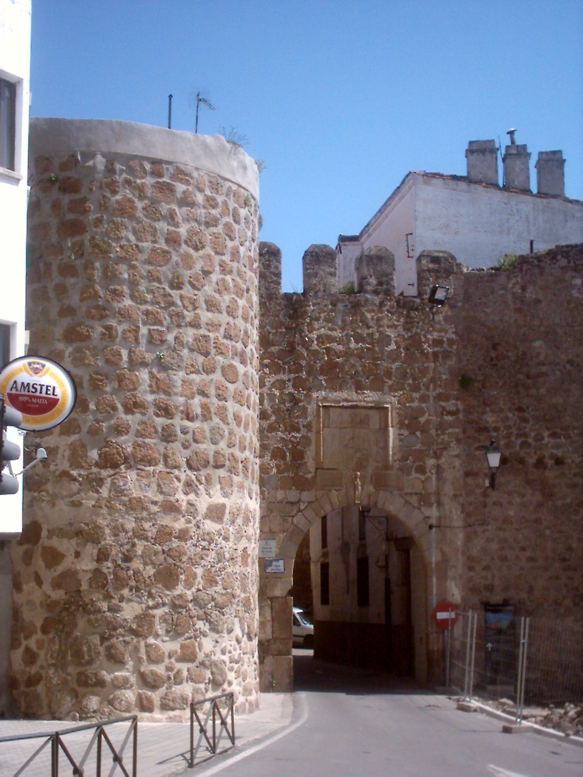 Panorámica de la puerta de Berrozanas en Plasencia, España